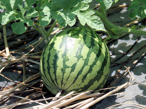 Citrullus lanatus